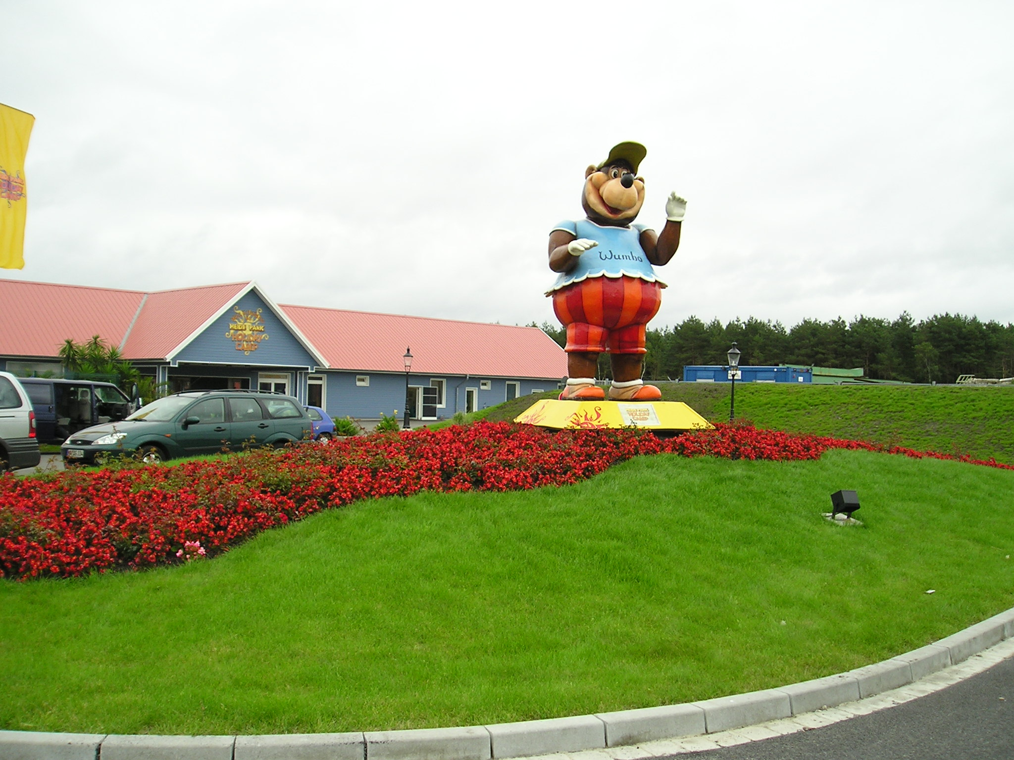 Maskottchen Wumbo vor dem Eingang des Holiday Camps im Heide-Park